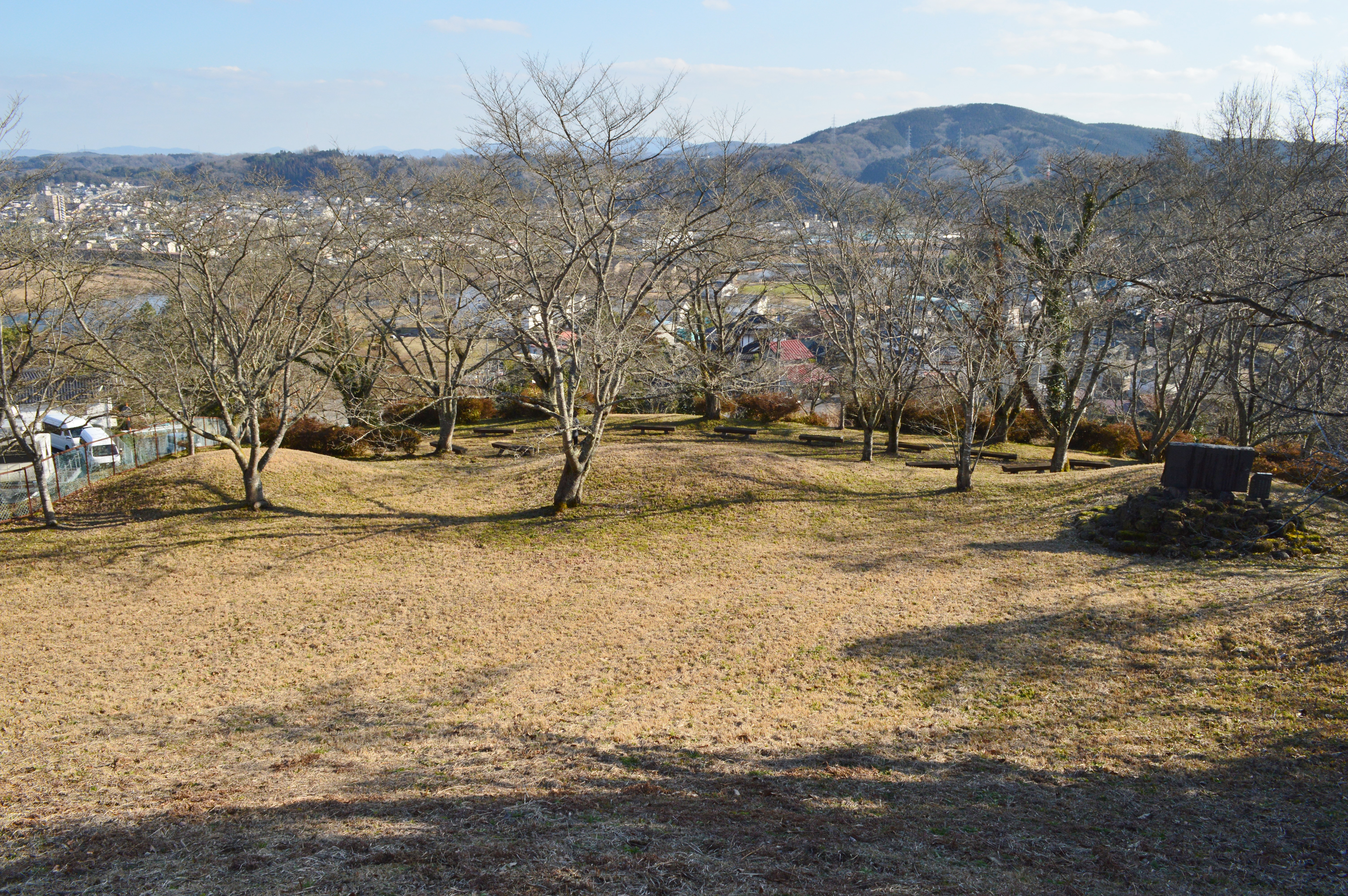 岩脇古墳から岩脇古墳群を望む Nikon D3200